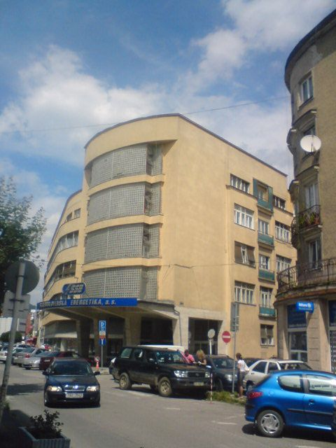 Budova stredoslovenskej energetiky v Žiline (Slovakia)